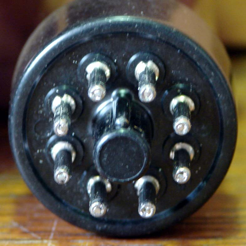 Oktalockel einer EL34-Elektronenröhre